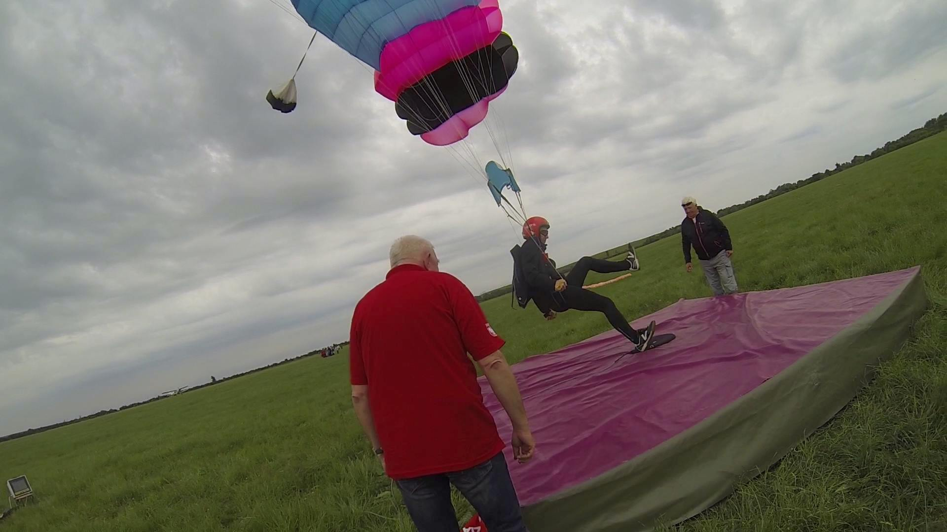 Spadochronowe Mistrzostwa Śląska 2016, Marcin Willner ląduje w „centro“ - Sekcja Spadochronowa Aeroklubu Gliwickiego